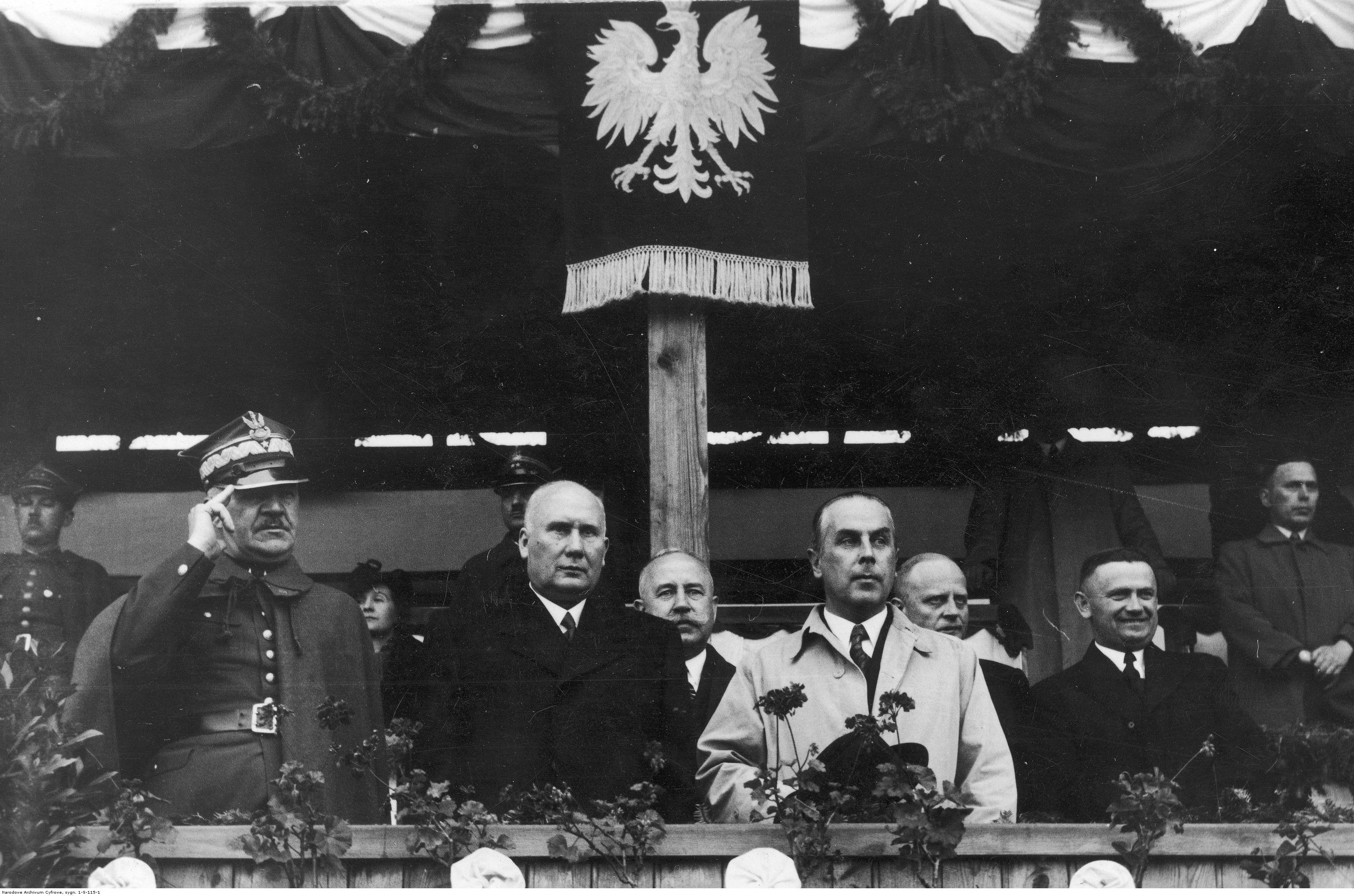 Jubileusz Łódzkiego Klubu Sportowego, czerwiec 1939. Goście zaproszeni na uroczystości jubileuszowe odbierają defiladę członków klubu. Na trybunie stoją od lewej: generał Franciszek Dindorf-Ankowicz, prezydent Łodzi Jan Kwapiński, prezes Łódzkiego Klubu Sportowego Józef Wolczyński, wojewoda łódzki Henryk Józewski. Koncern Ilustrowany Kurier Codzienny - Archiwum Ilustracji. Sygnatura: 1-S-115-1